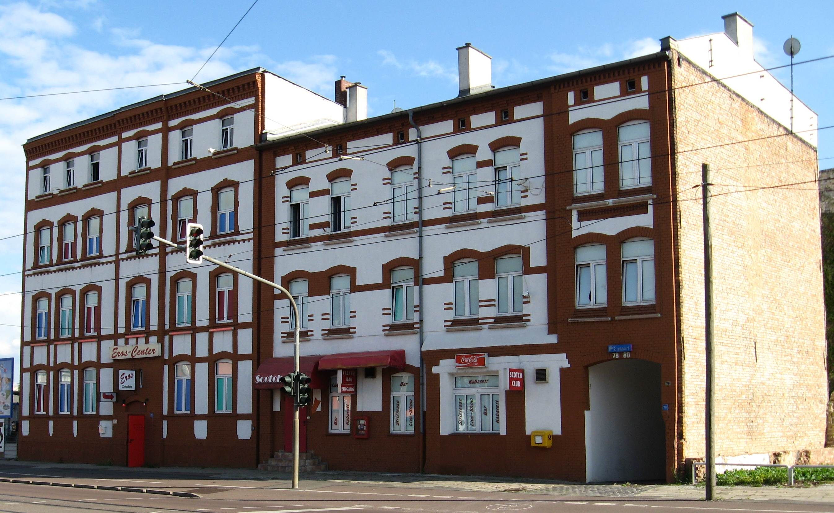 Eros-Center in der Delitzscher Straße in Halle (Saale)